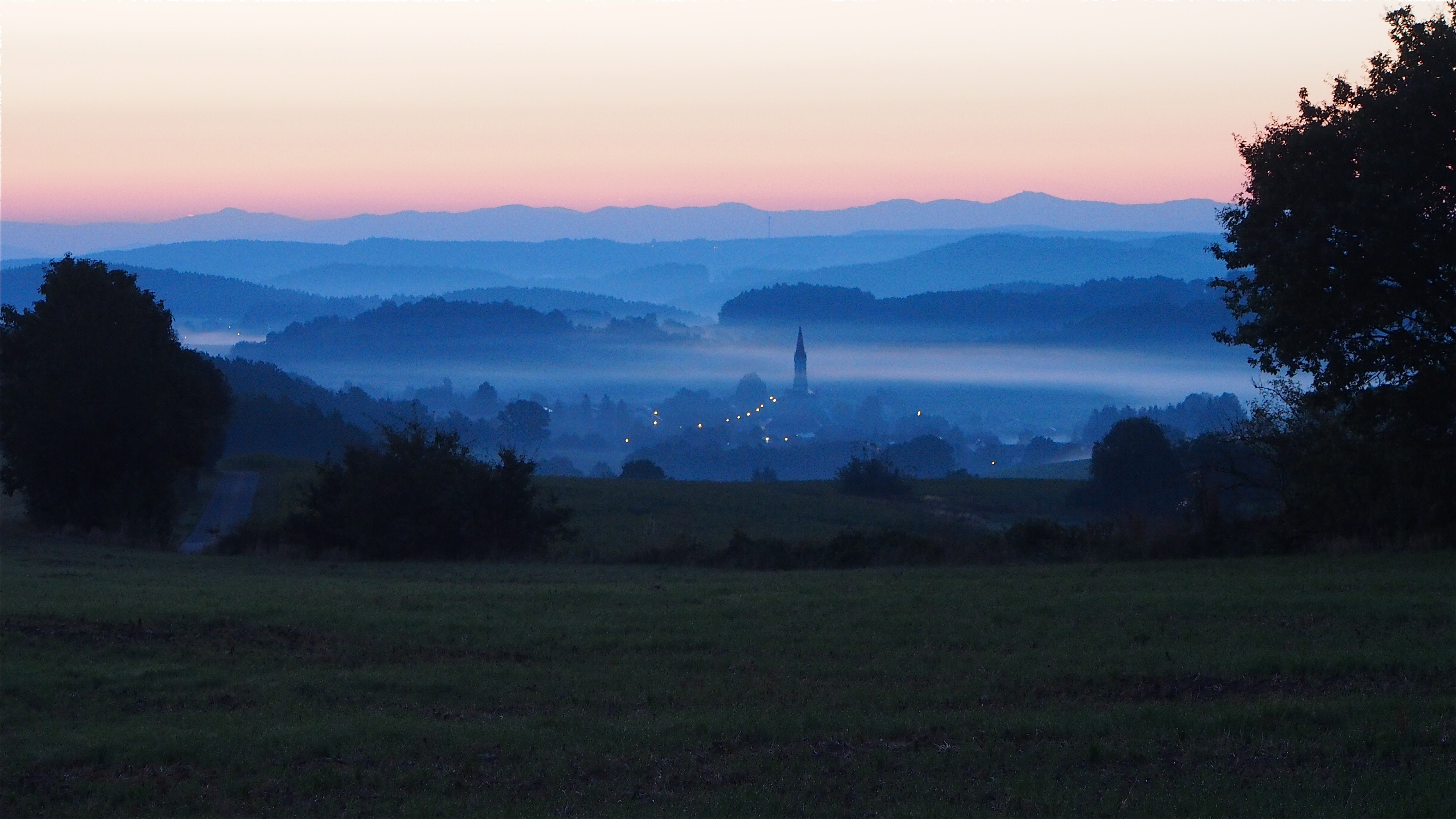 Blick auf den Arber am frühen Morgen